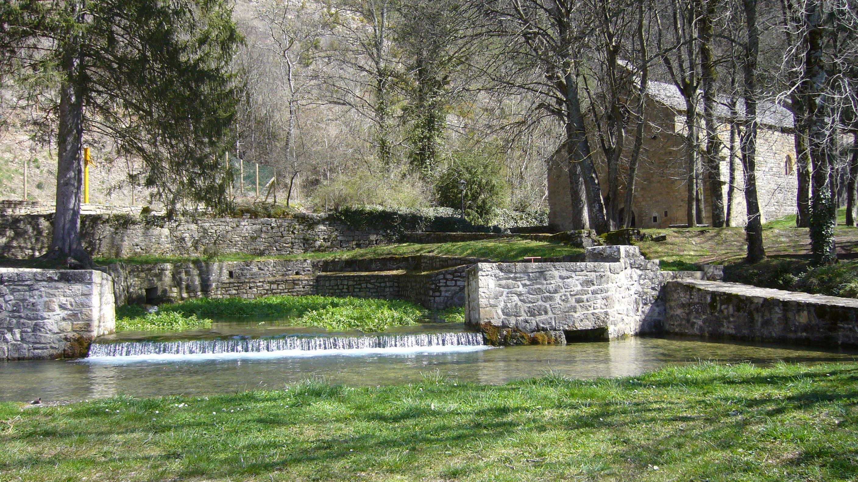 La fontaine et la chapelle St-Frézal à La Canourgue, Lozère